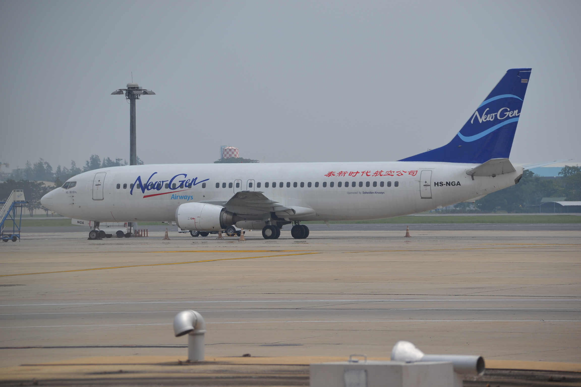 Boeing 737/4 of NewGen Airways at Bangkok Don Mueang-DMK, 16/10/14.